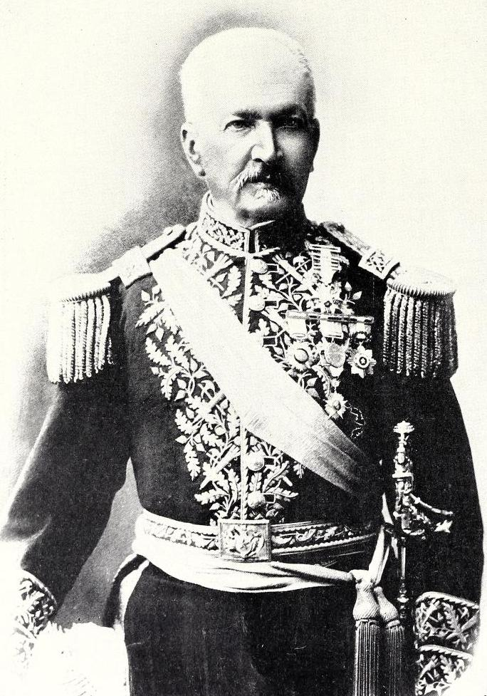 General Don Manuel Baquedano.